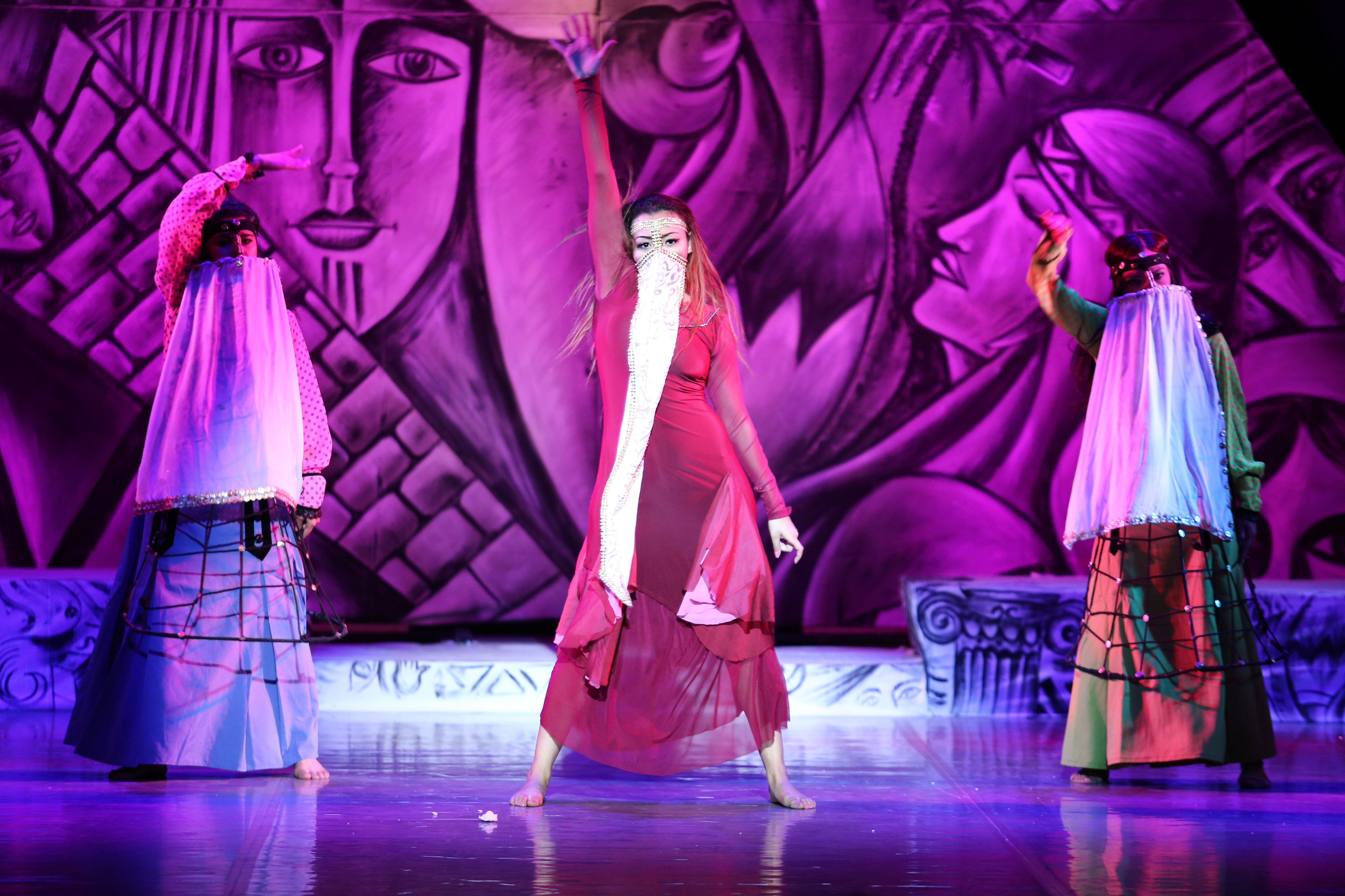 الفلكلور الشعبى فى مصر This is an image of music and dance from Egypt